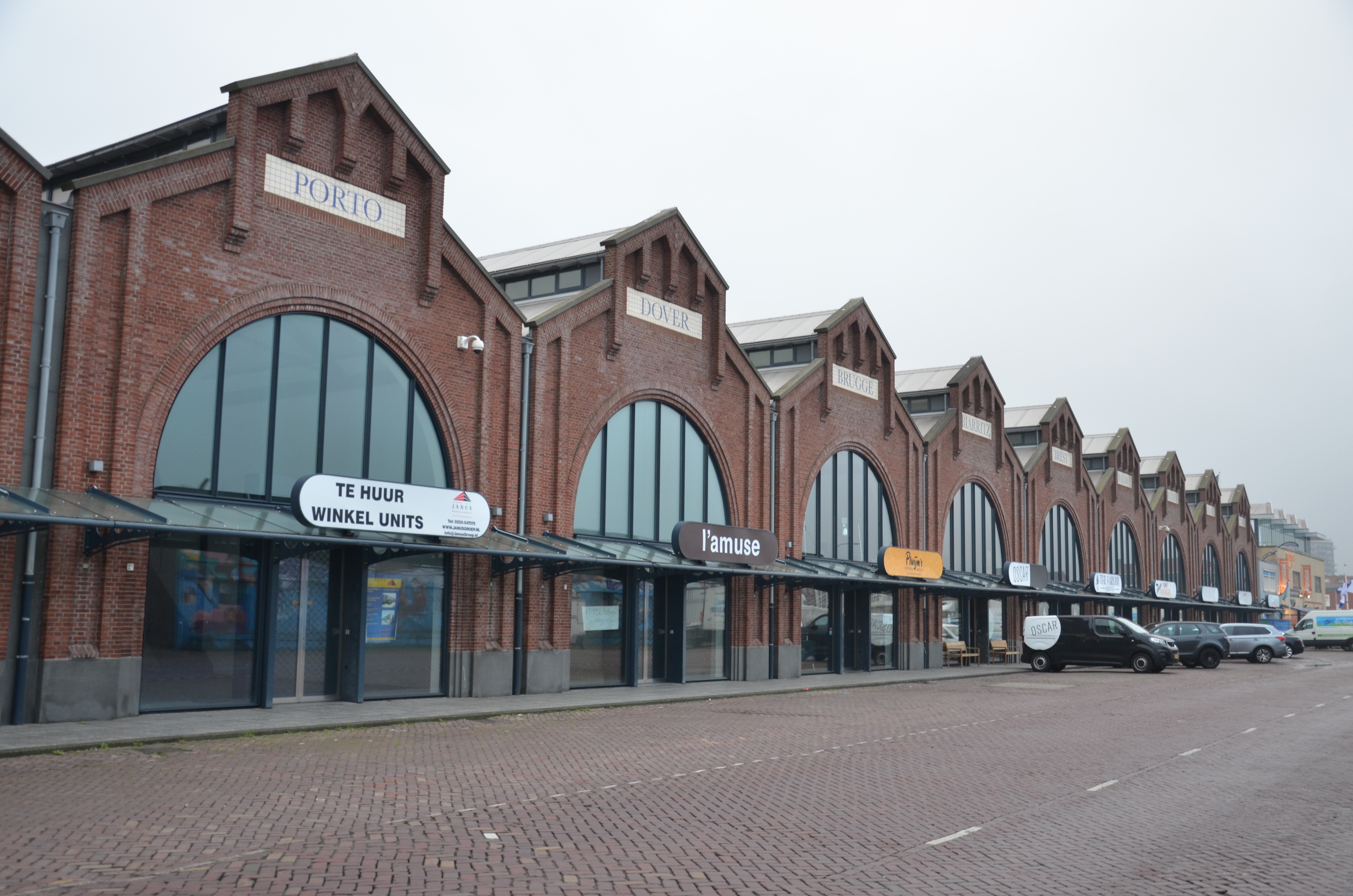 De Halkade in IJmuiden.